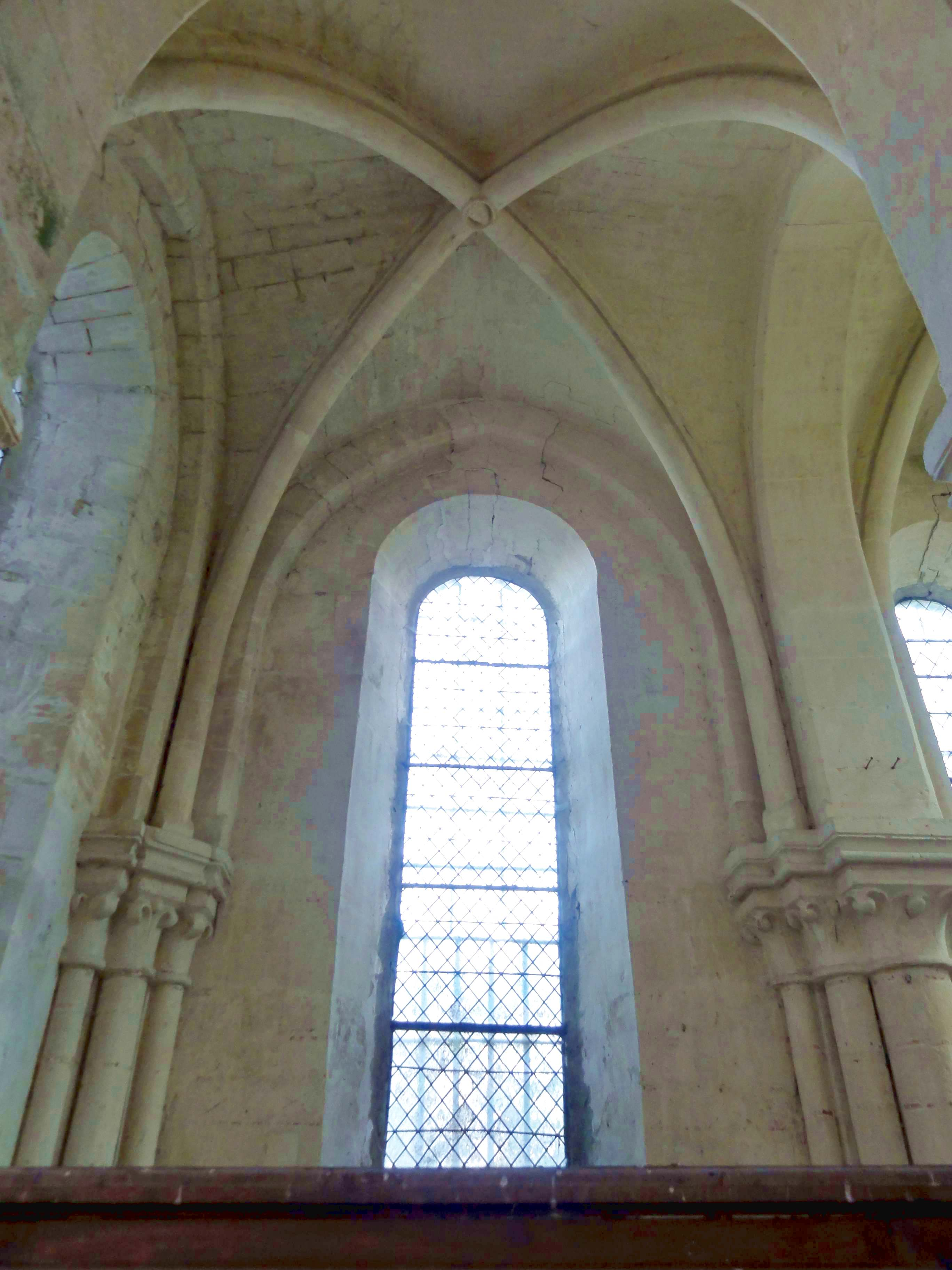 Intérieur de l'église - voir titre.